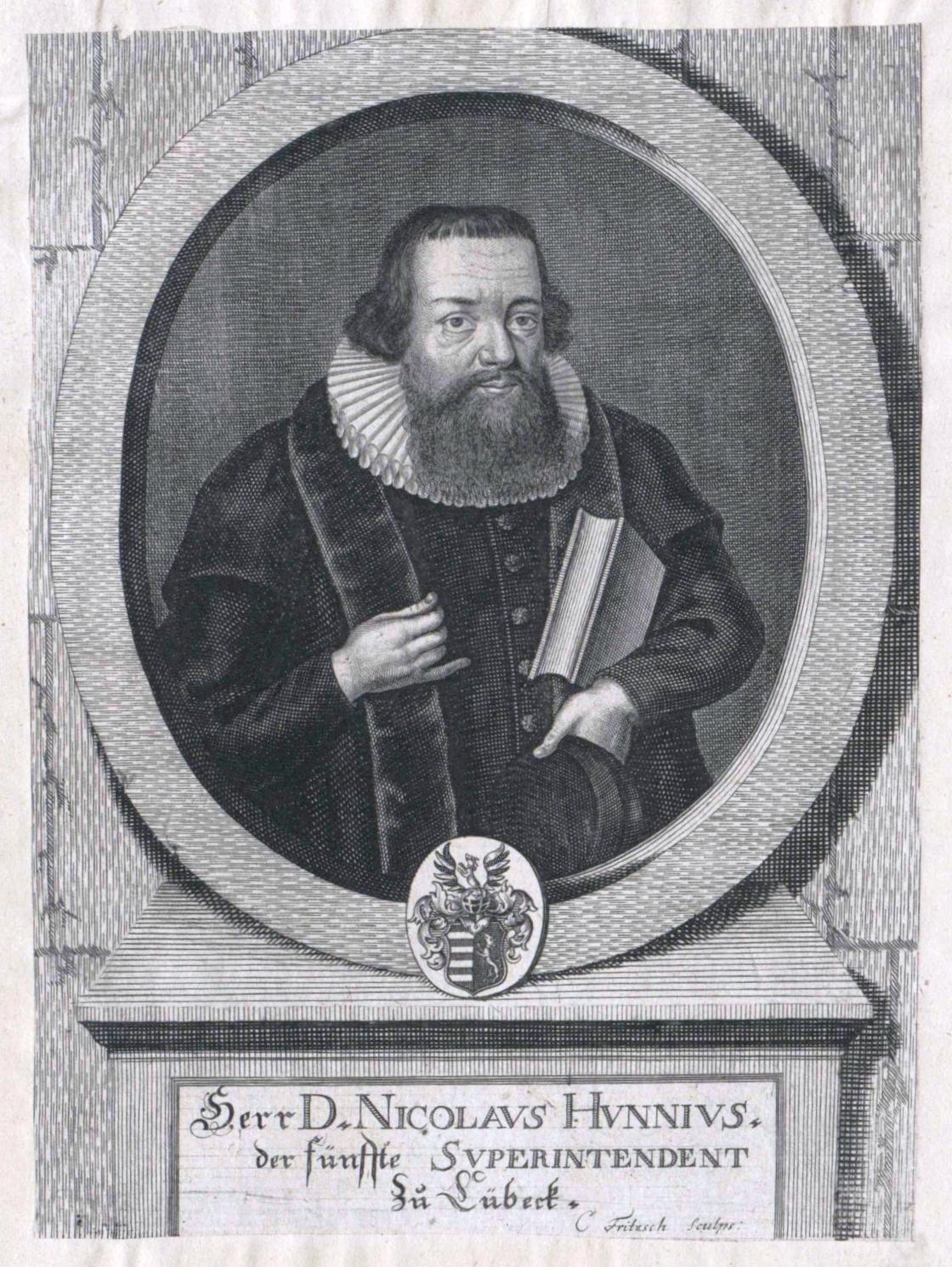 Nikolaus Hunnius (1585–1643)